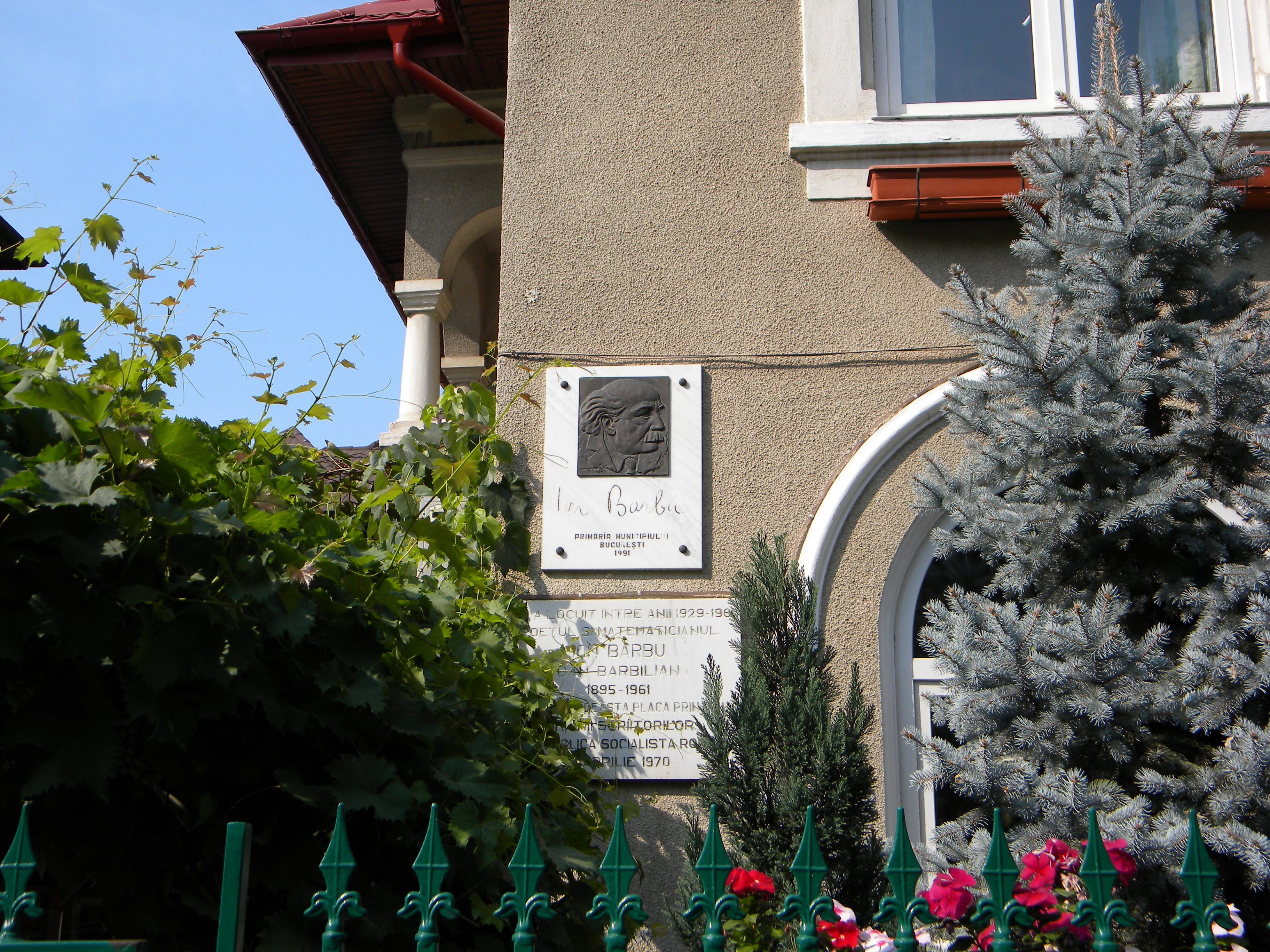 Casa pe Str. Carol Davila nr. 8 (Casa Ion Barbu) Bucuresti sect. 5 (detaliu 1)